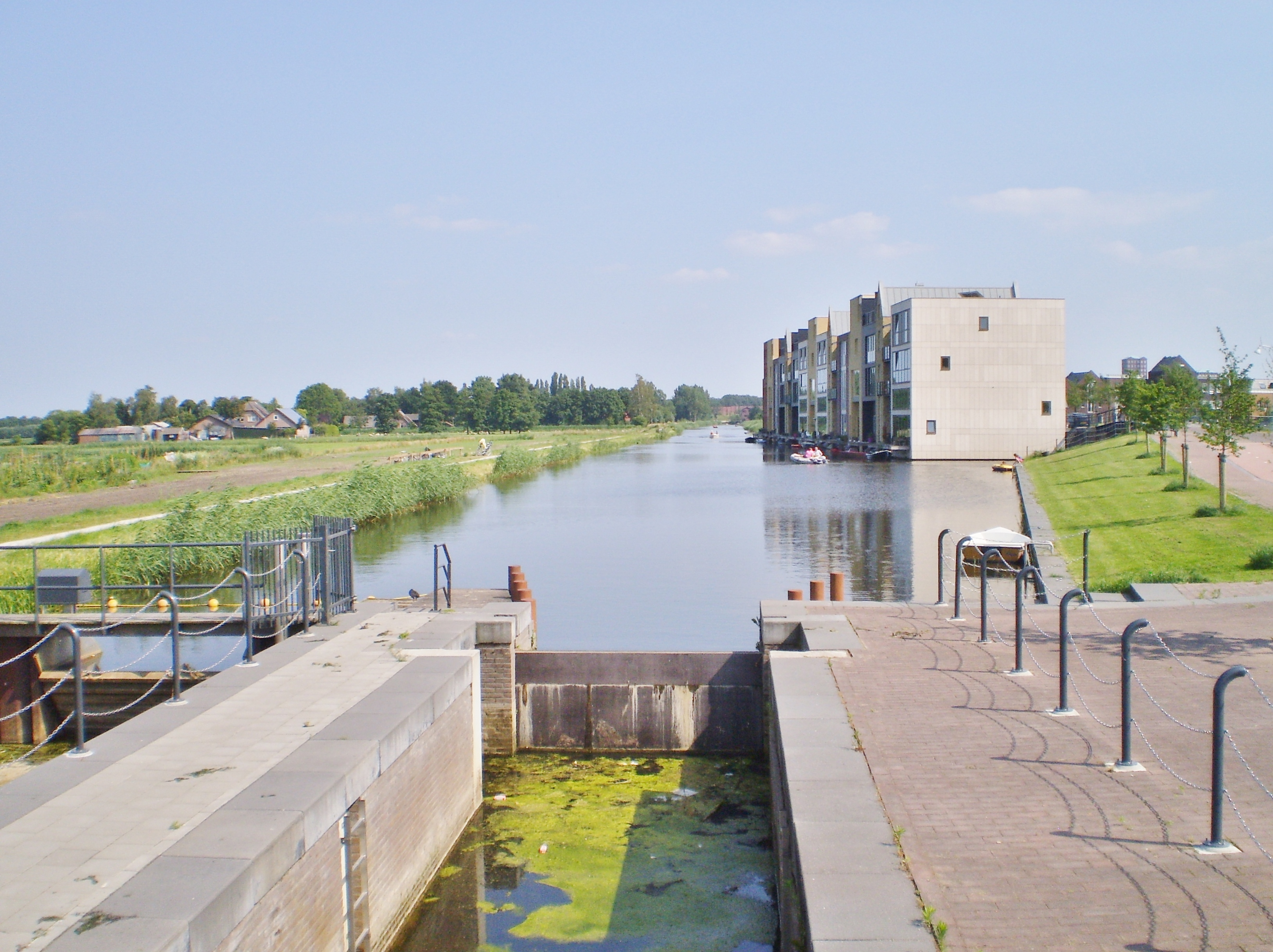 vanaf de sluis in de Laak met het gezicht richting Hoevelaken, rechts de wijk Laak2